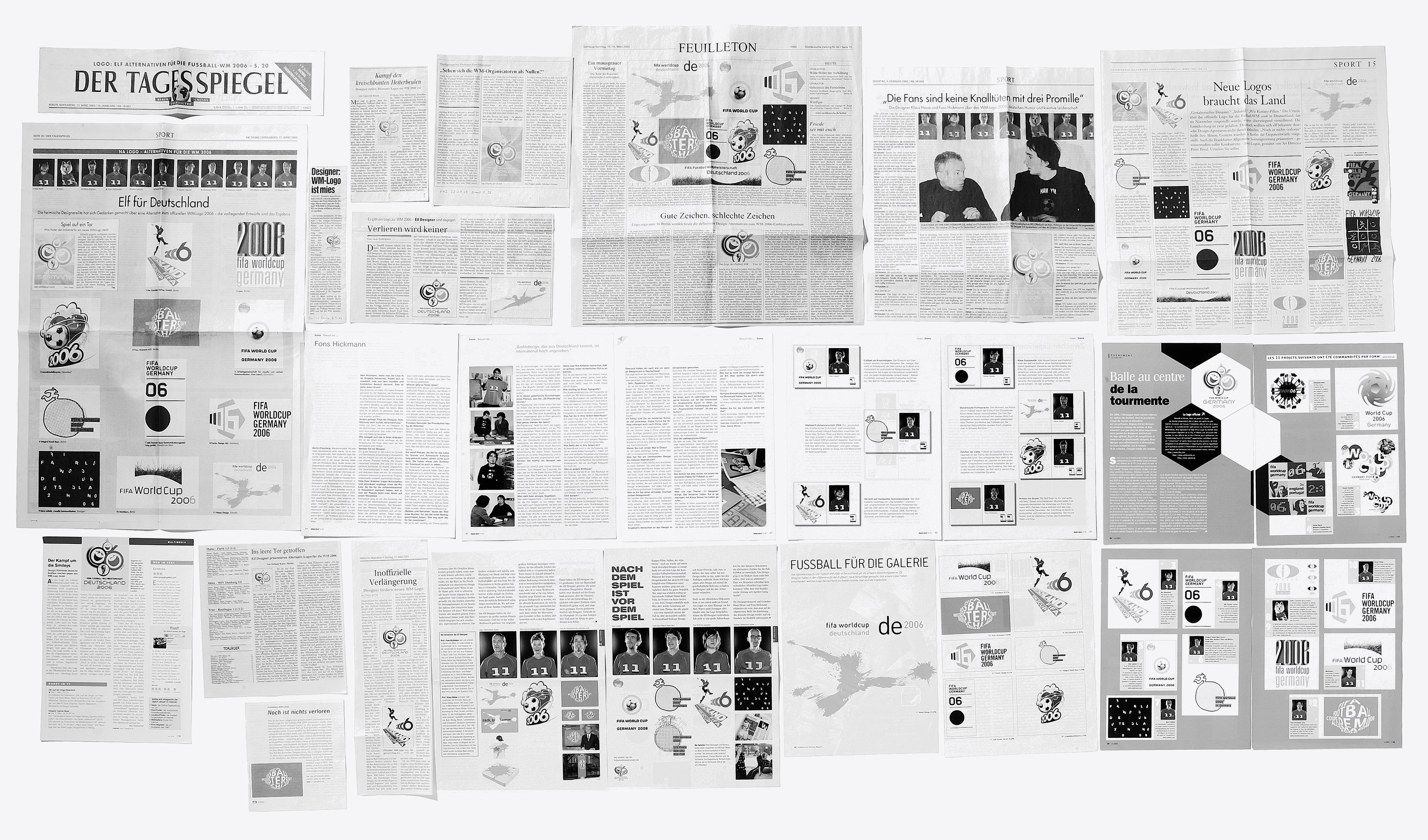 Artikel verschiedener Zeitungen, die über die Initiative 11 Designer für Deutschland berichtet haben.